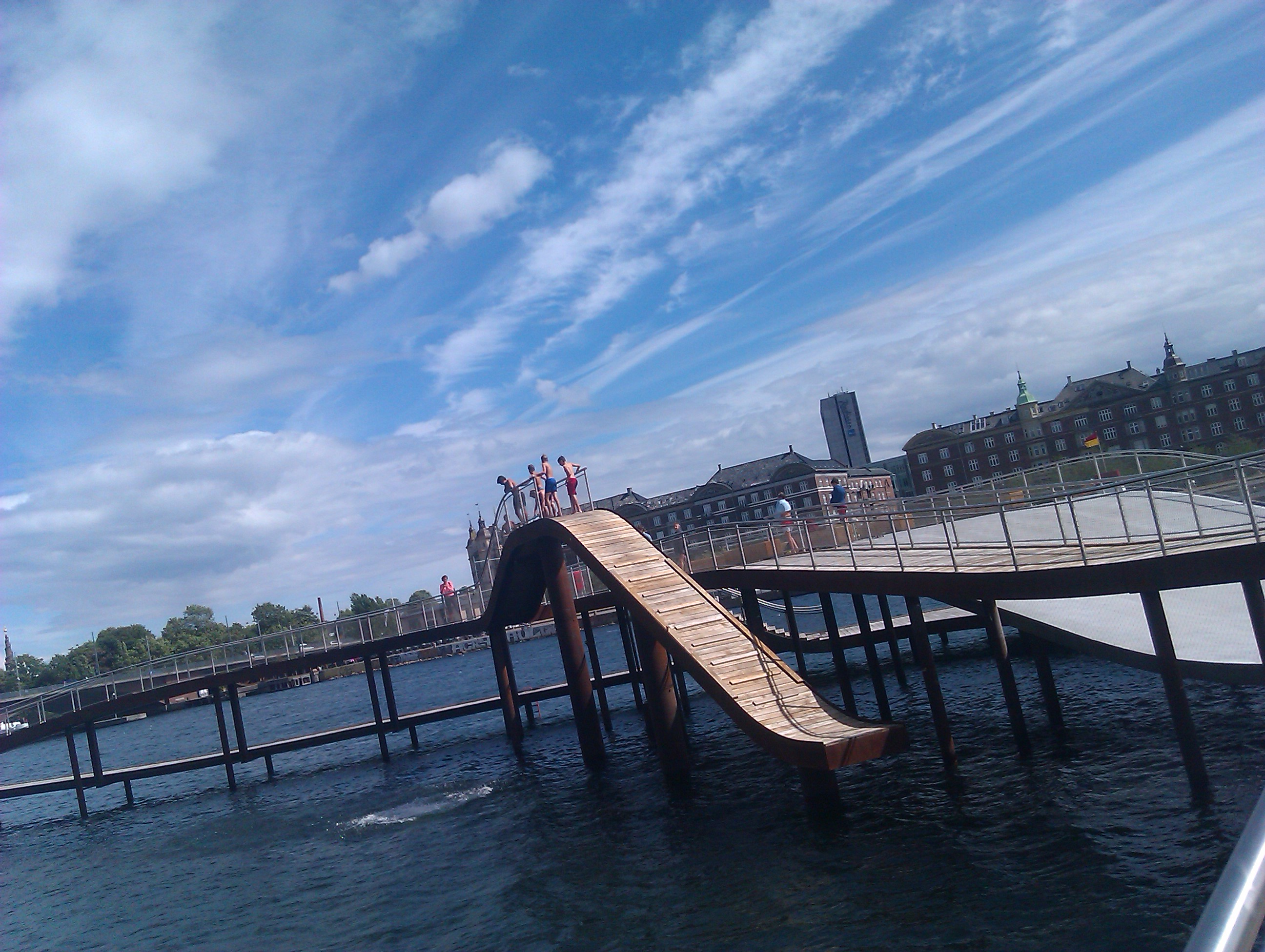 Kalvebod Bølge, havnepromenade, København